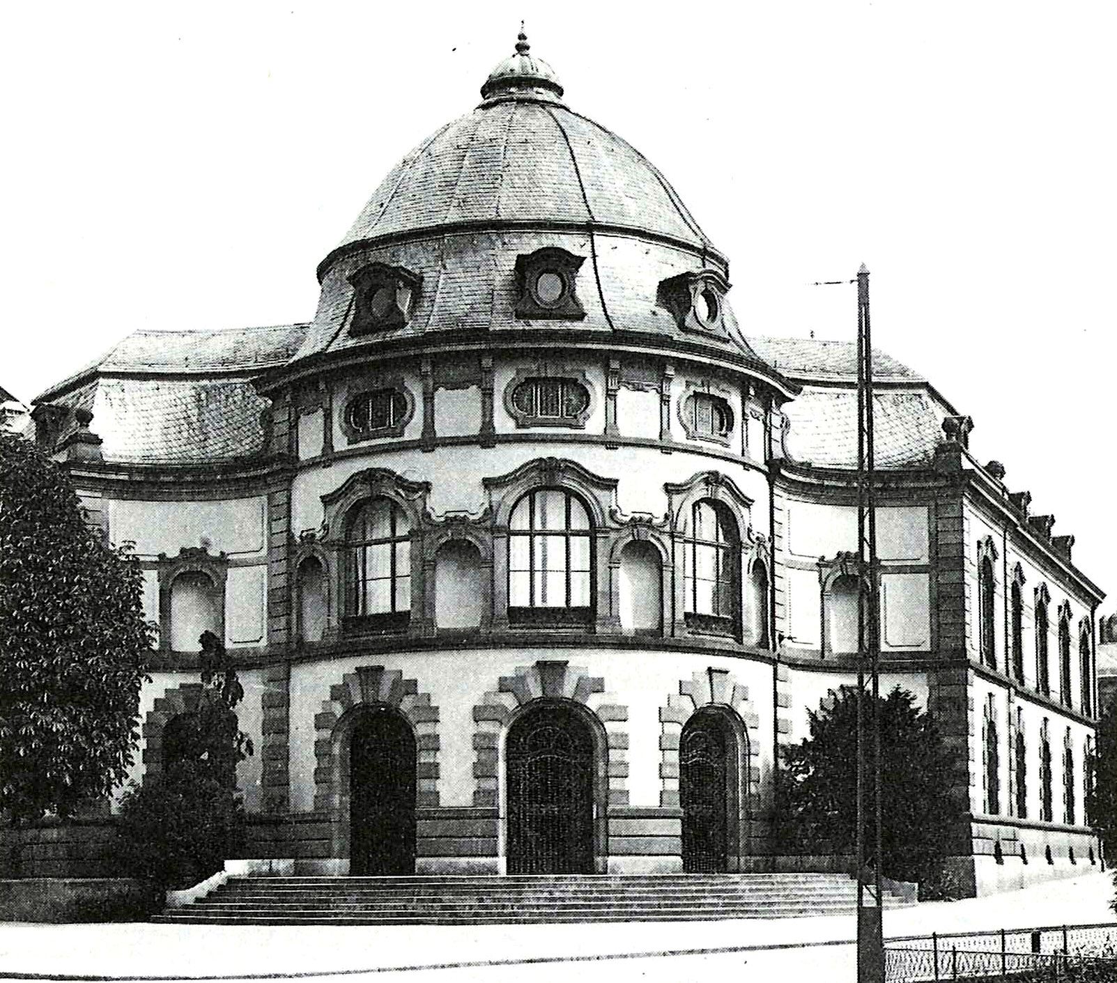 Universitätsbibliothek Basel, Hauptfassade. Erbaut 1894–1897, Architekt Emanuel La Roche (1863–1922). Ersetzt durch Neubau 1962–1967.